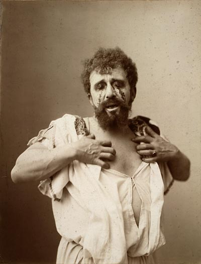 Albert Greiner sr. & jr. (ca. 1896): Der niederländische Schauspieler Louis Bouwmeester als der geblendete Ödipus in Sophokles' Drama.